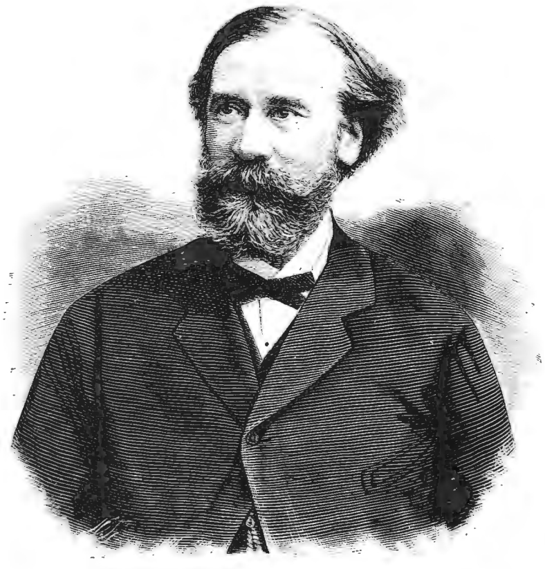 Н.В. Гербель, портрет